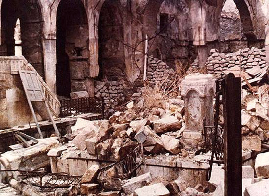 שריפת בית הכנסת בחאלב 1947